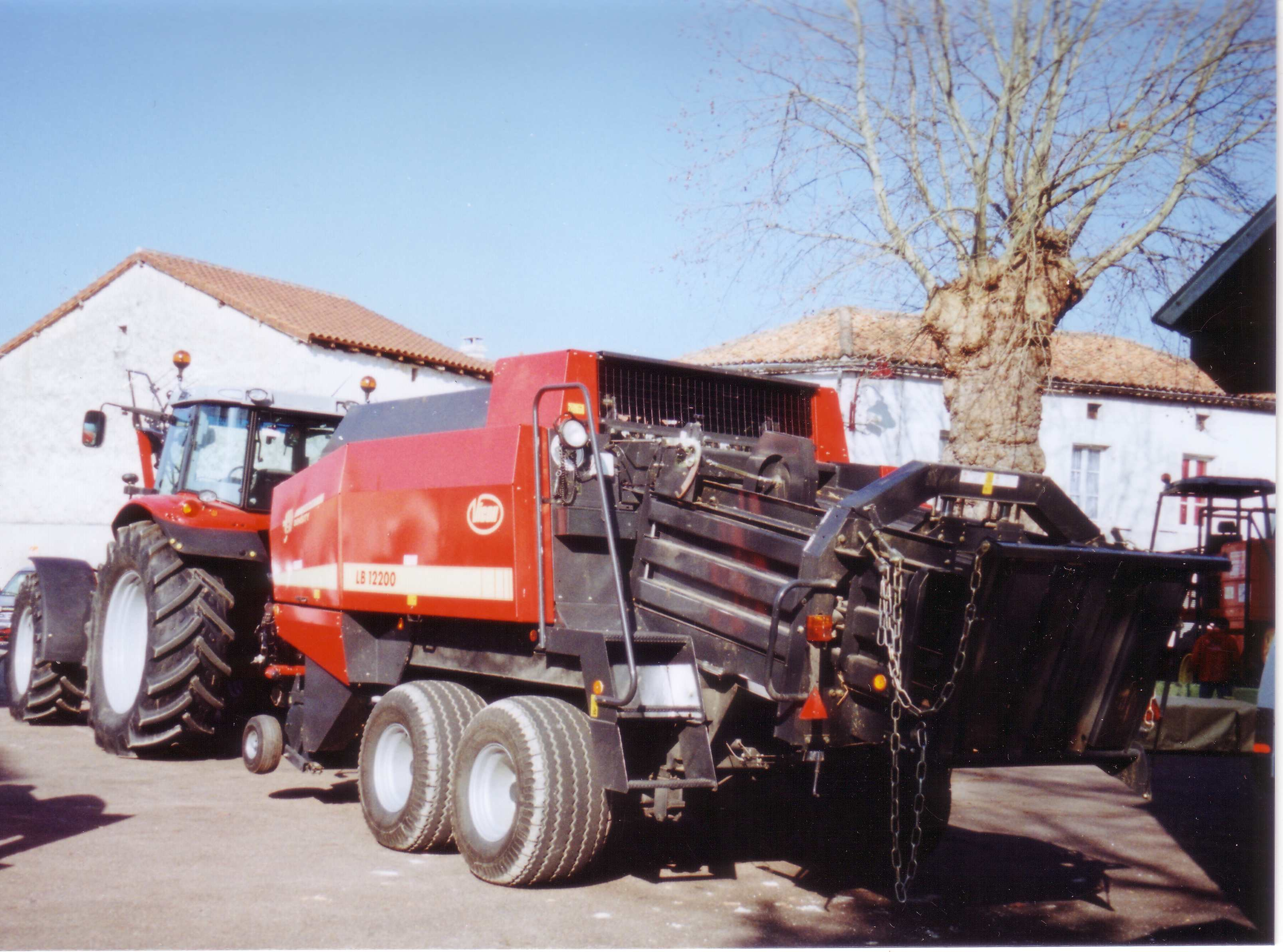 Presse haute densité, Vicon LB 12 200